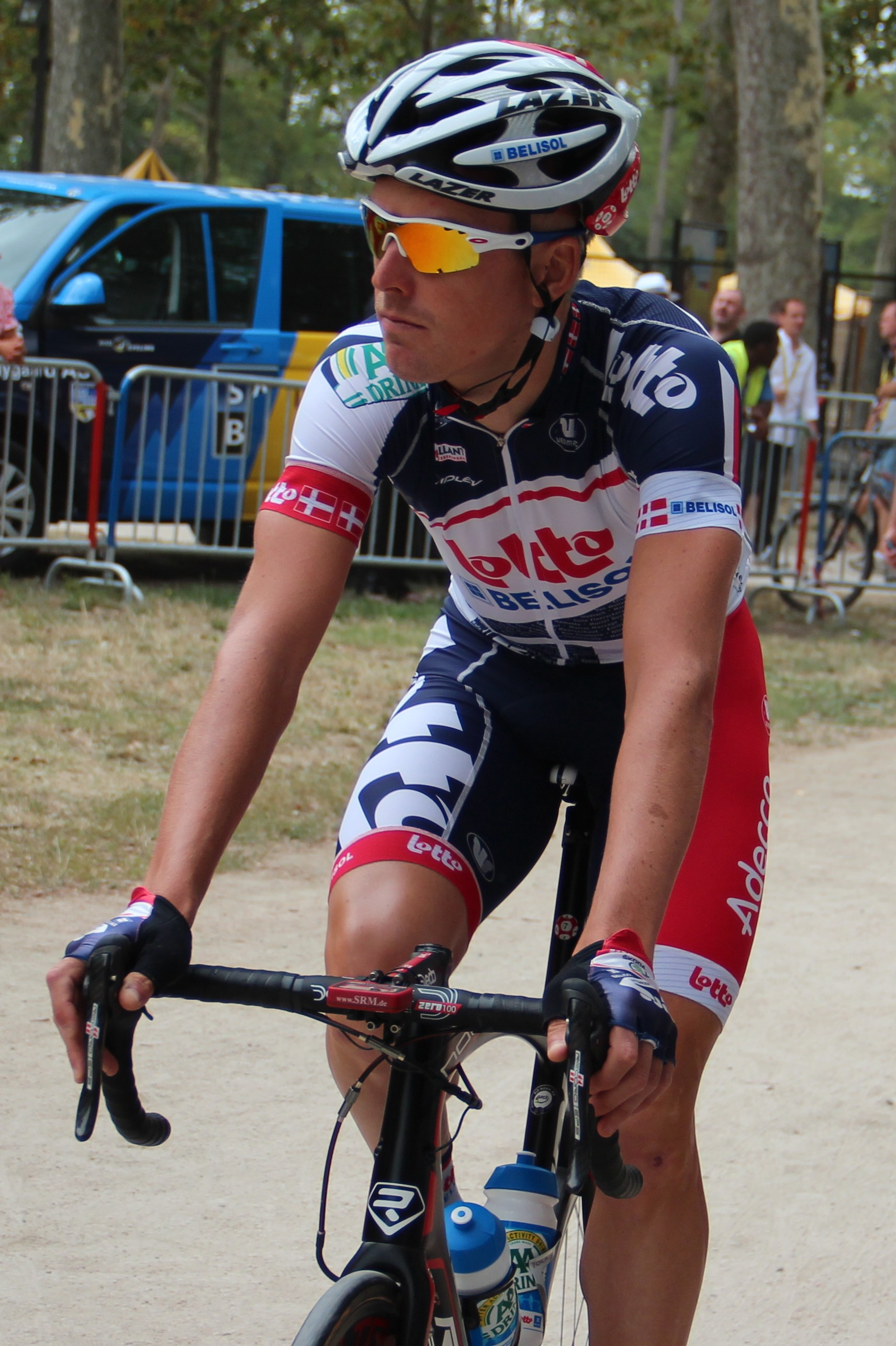 Lars Ytting Bak avant le départ de la 18e étape du Tour de France 2012.